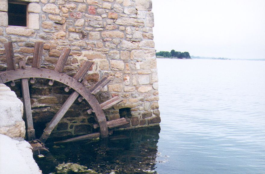 Moulin à marées de l'Île d'Arz